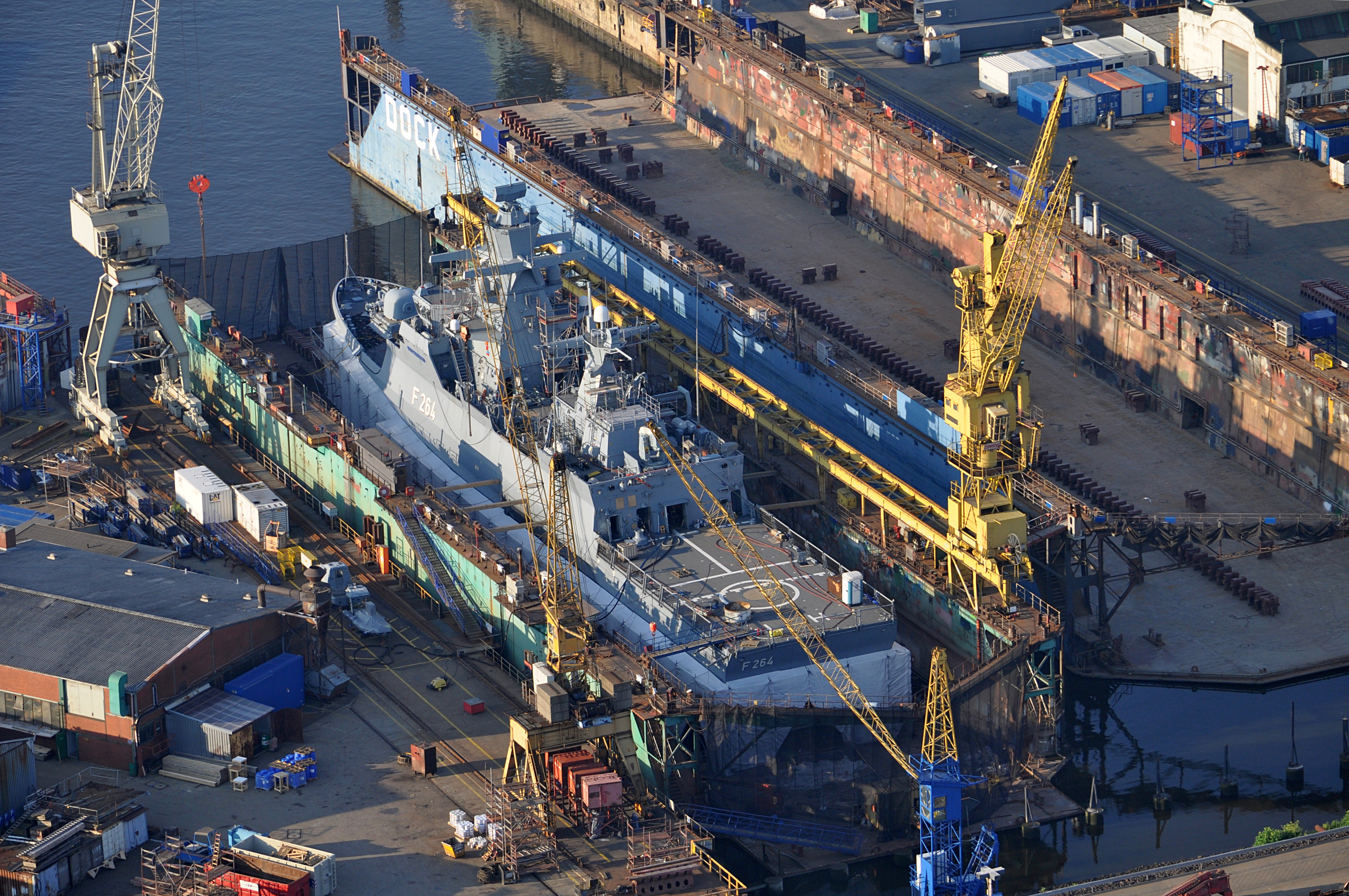 Korvette Ludwigshafen am Rhein der Bundesmarine in einem Dock der Norderwerft in Hamburg-Steinwerder.